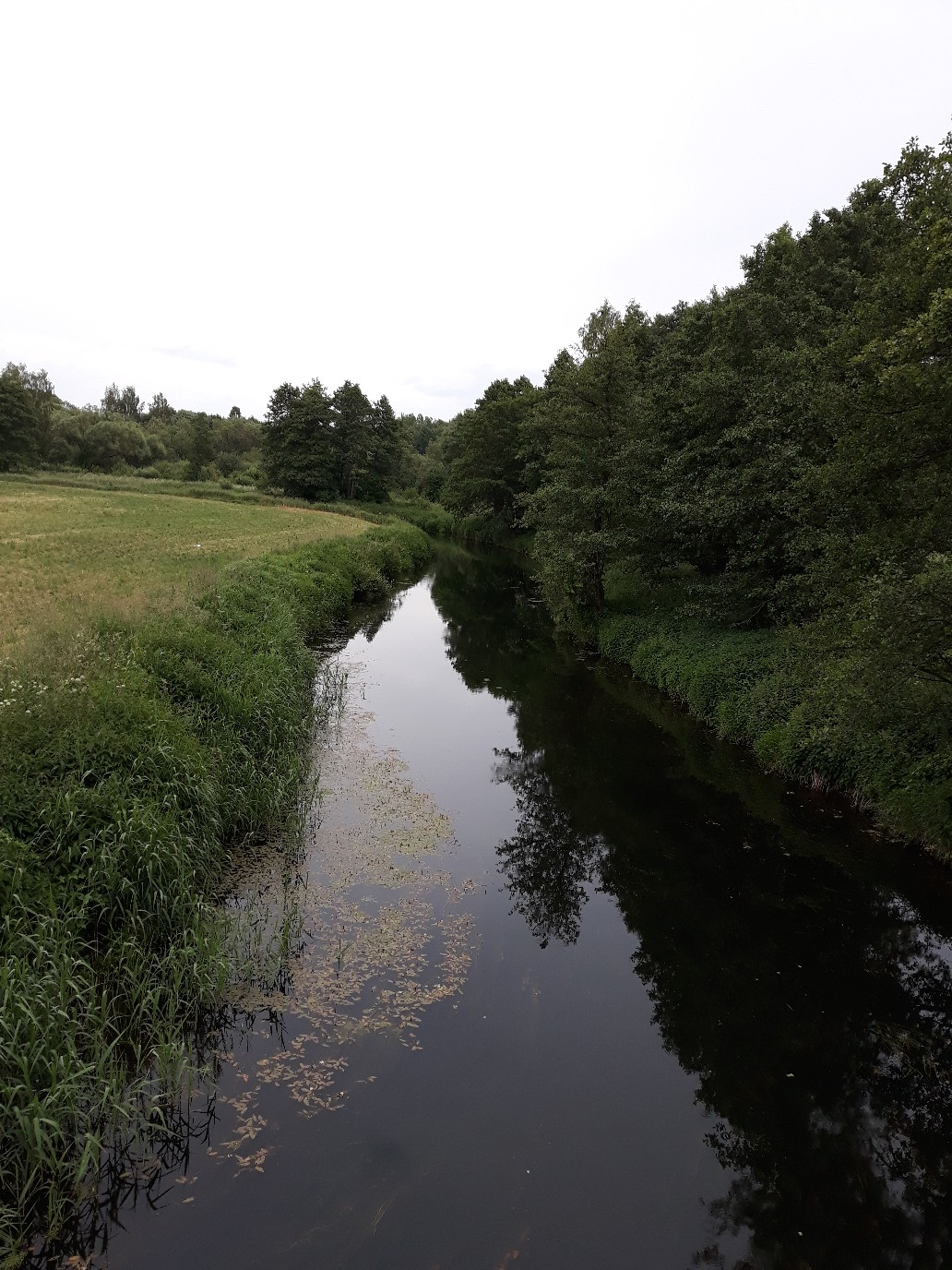 Уса ля Станькава